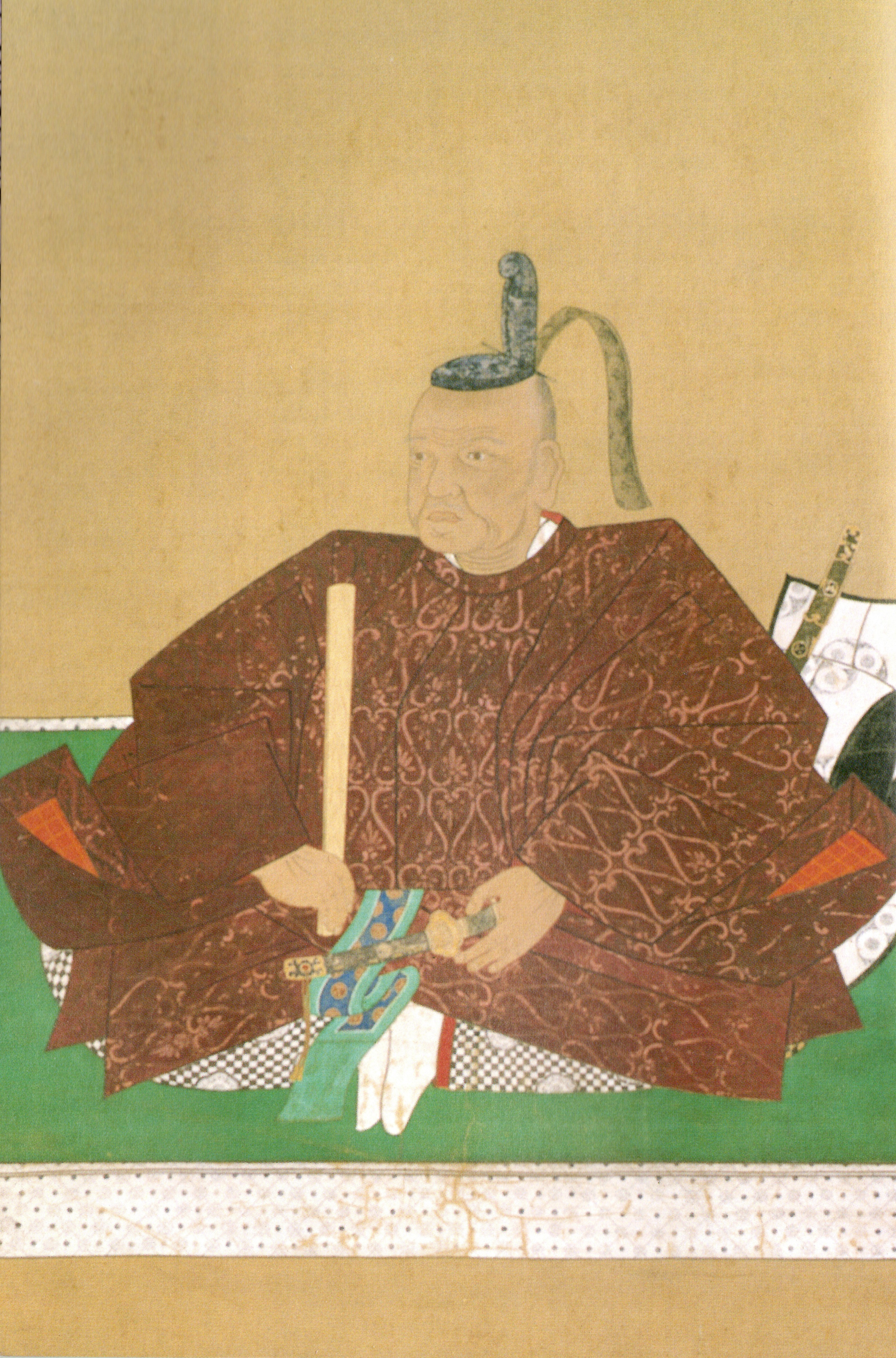 永井直勝の肖像。